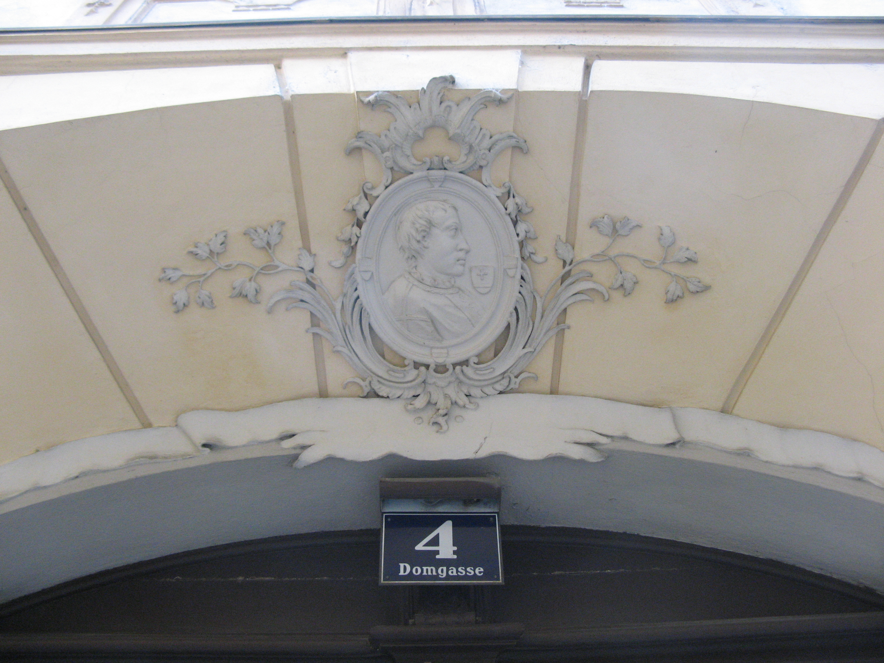 Trienter Hof, Domgasse 4, Wien-Innere Stadt